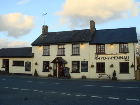 Tafarn Rhydypennau, Rhydypennau